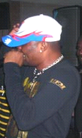 source : photo personnelle